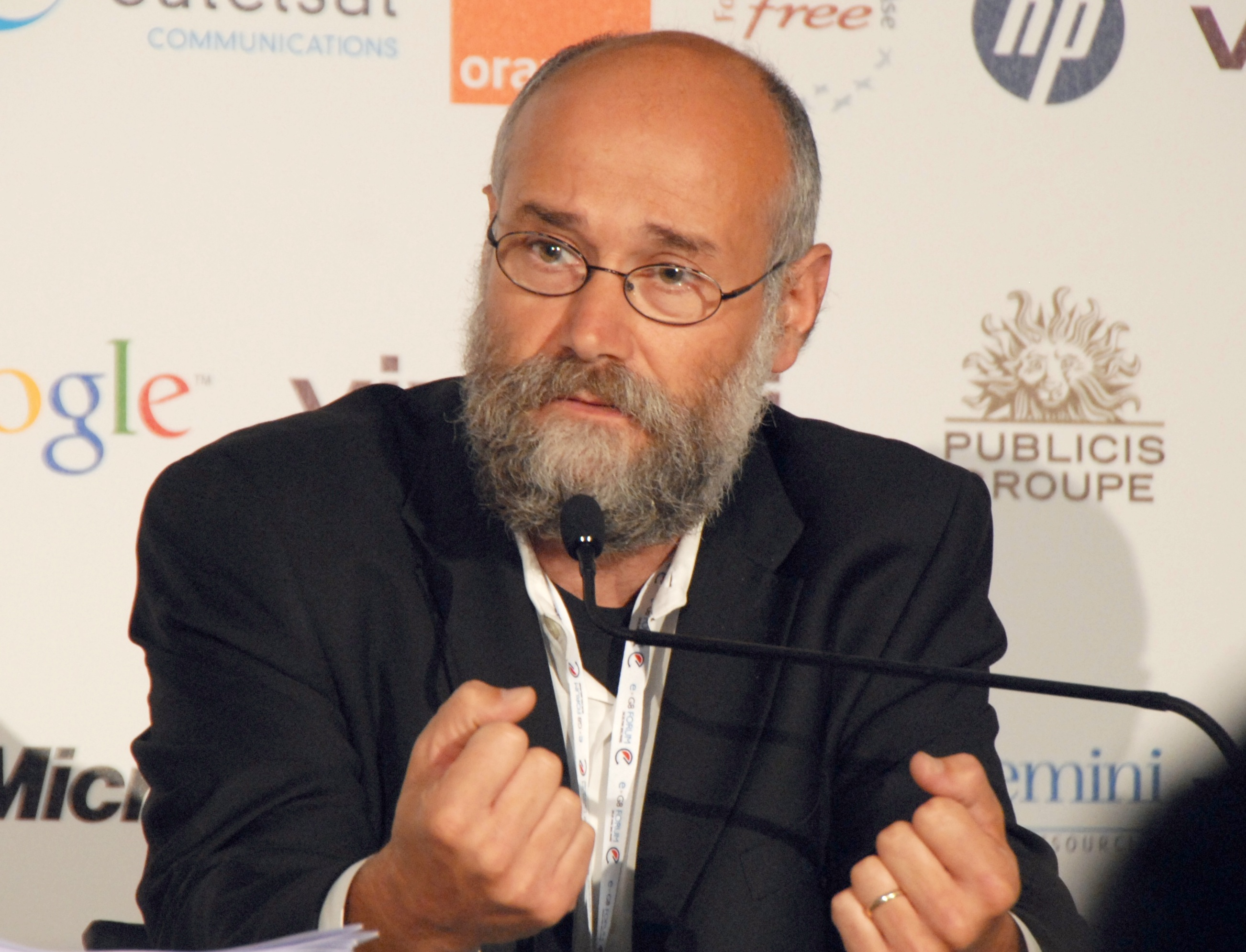 Yochai Benkler, professeur de droit à Harvard et spécialiste des sciences politiques à l'heure d'Internet, lors d'une table ronde à l'e-G8